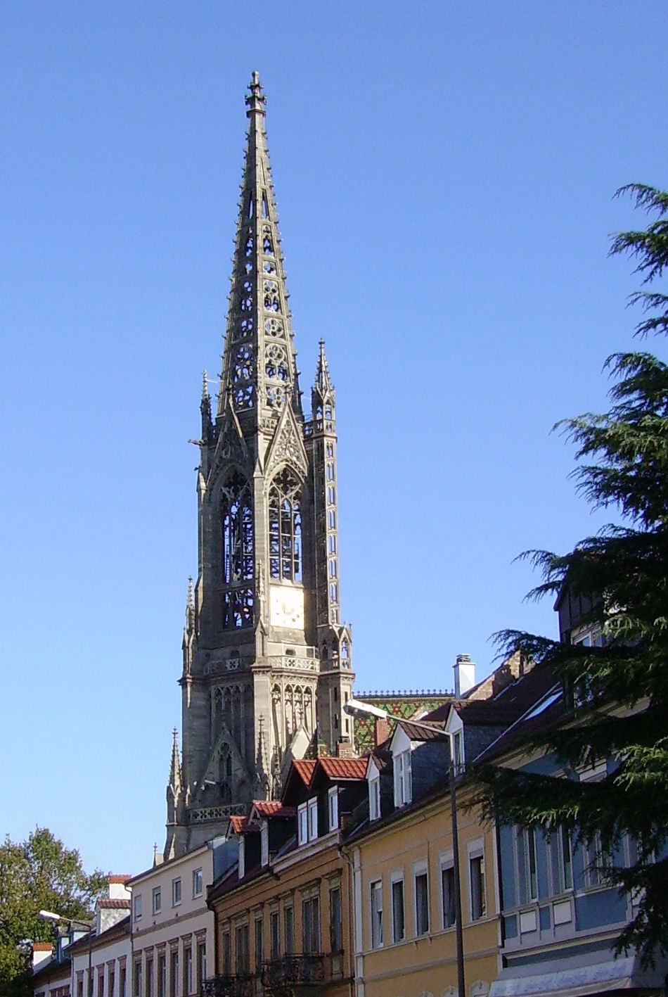 Gedächtniskirche (Memorial Church) in Speyer, Germany